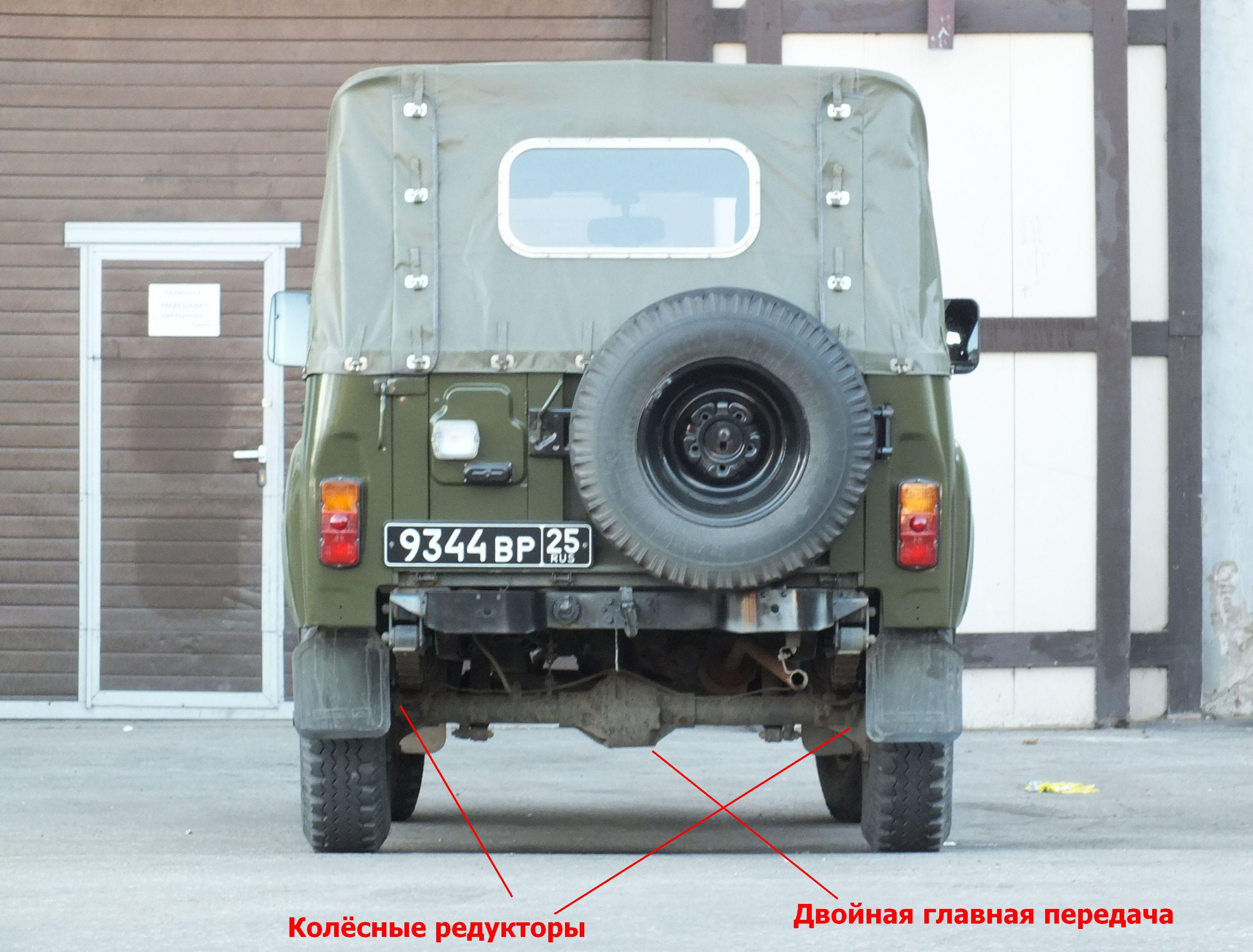 UAZ-3151